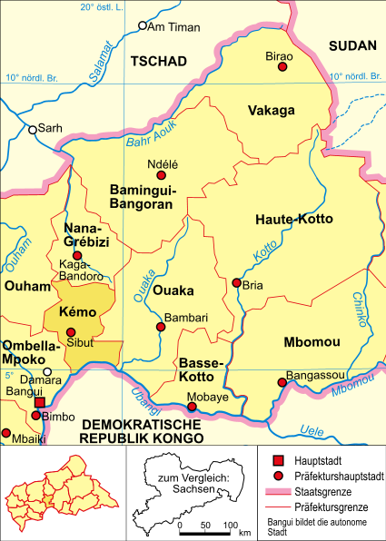 politische Karte der Zentralafrikanischen Republik (Präfektur Kémo hervorgehoben)